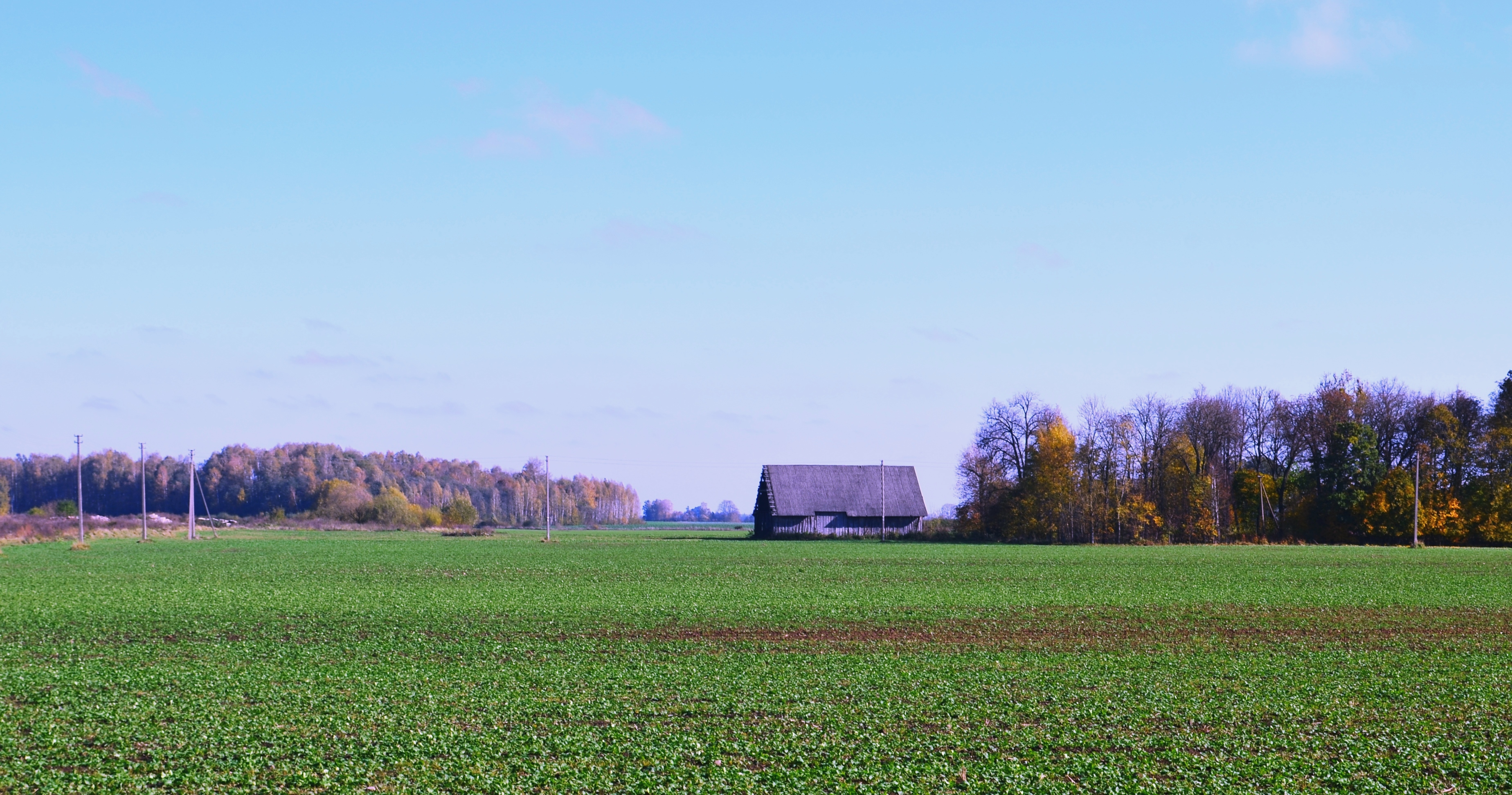 Medinis statinys, Gasčiūnai, Kėdainių raj.